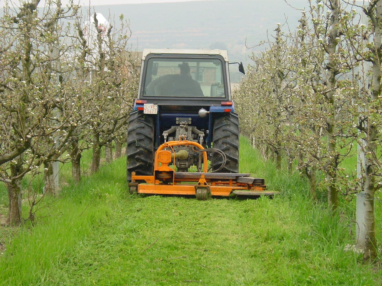 Perals